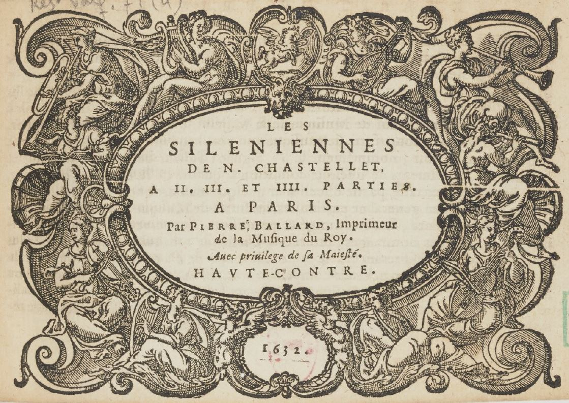 Title page of Du Chastelet's Siléniennes (Paris, 1632).